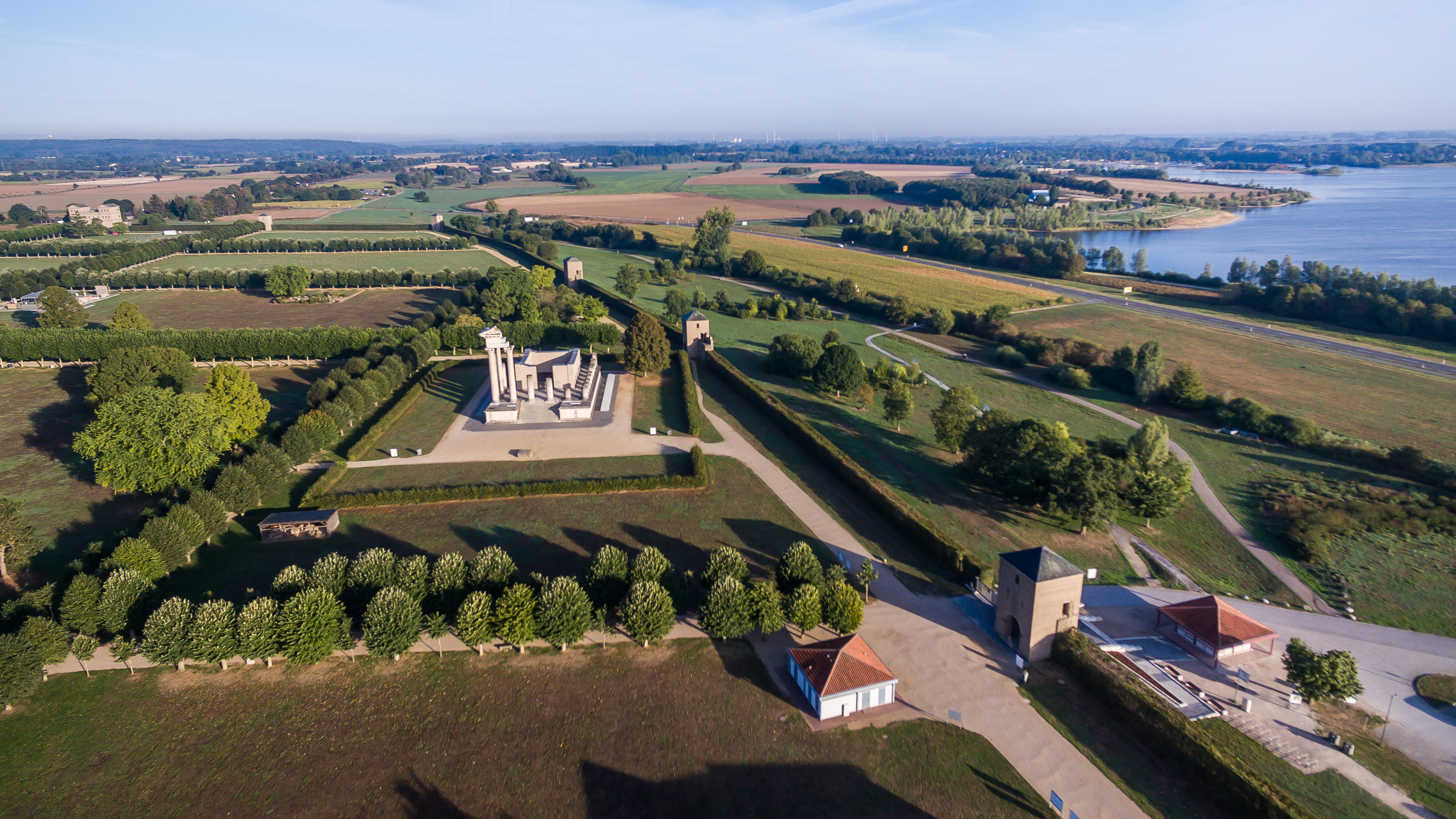 Colonia Ulpia Traiana.. LVR-Archäologischer Park Xanten. Luftaufnahme mit einem Quadkopter